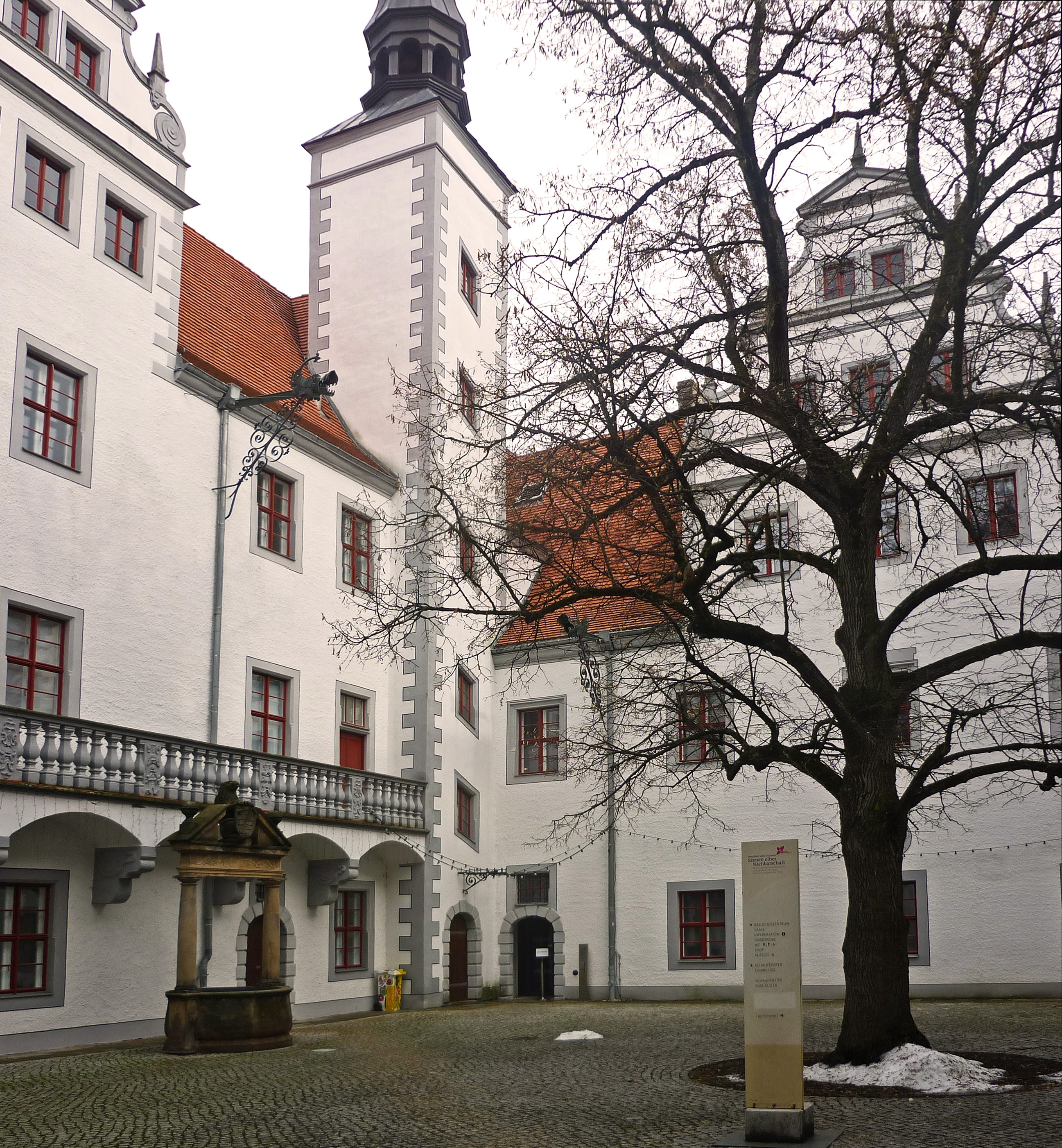 Schloss Doberlug, im Innenhof